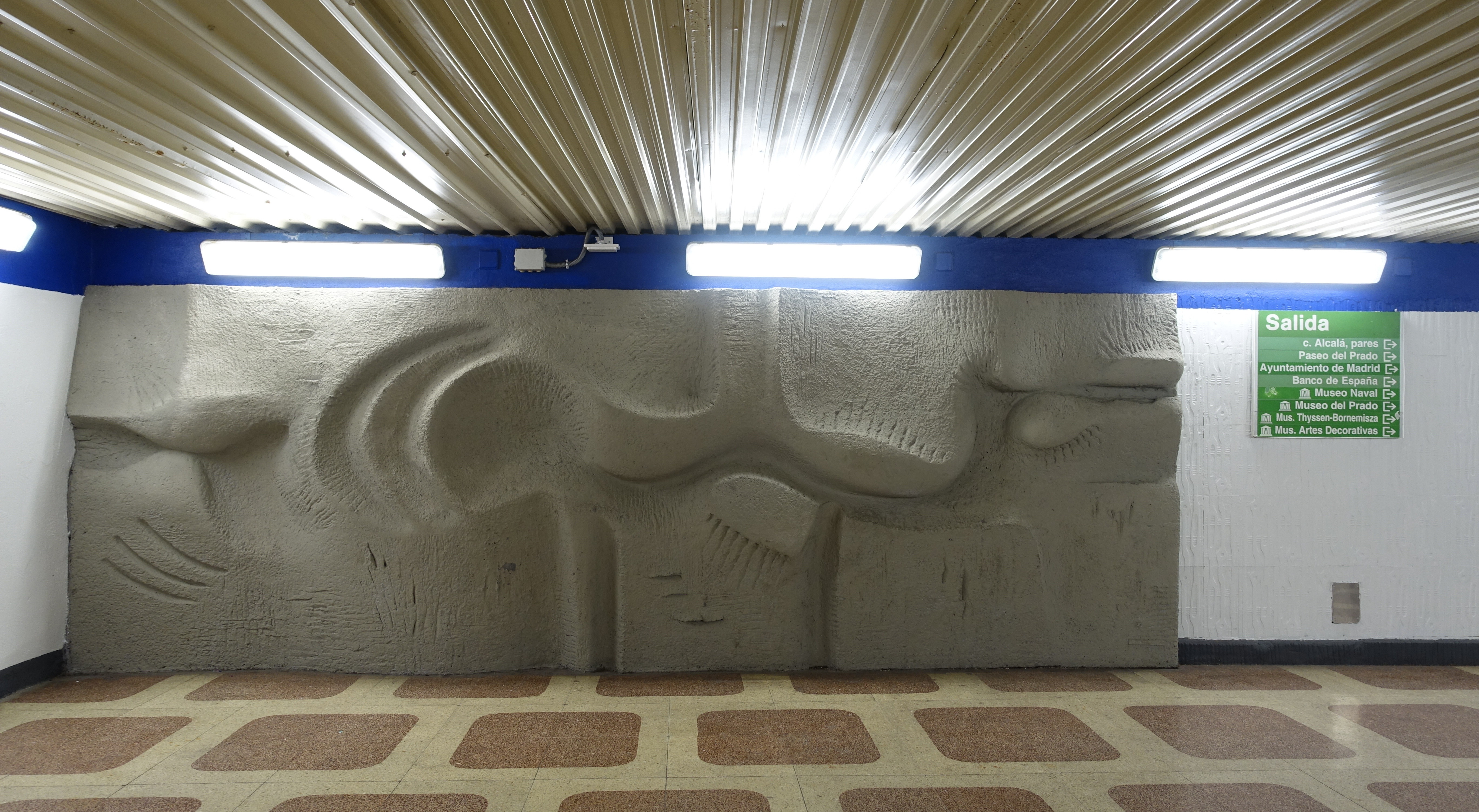 at Banco de Espana station.